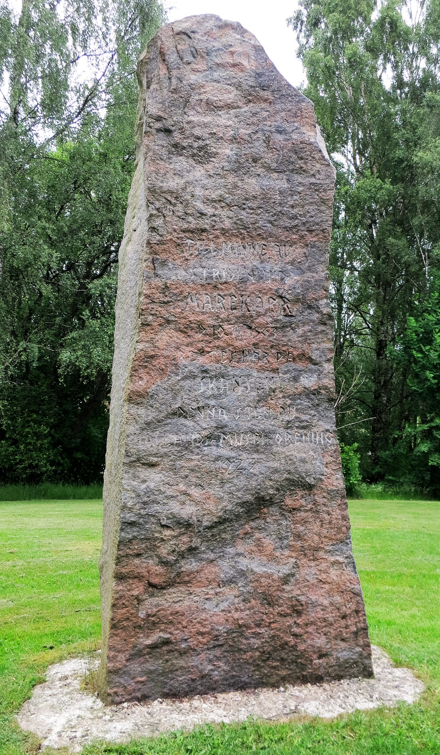 Till minne av slaget vid Mared 1563